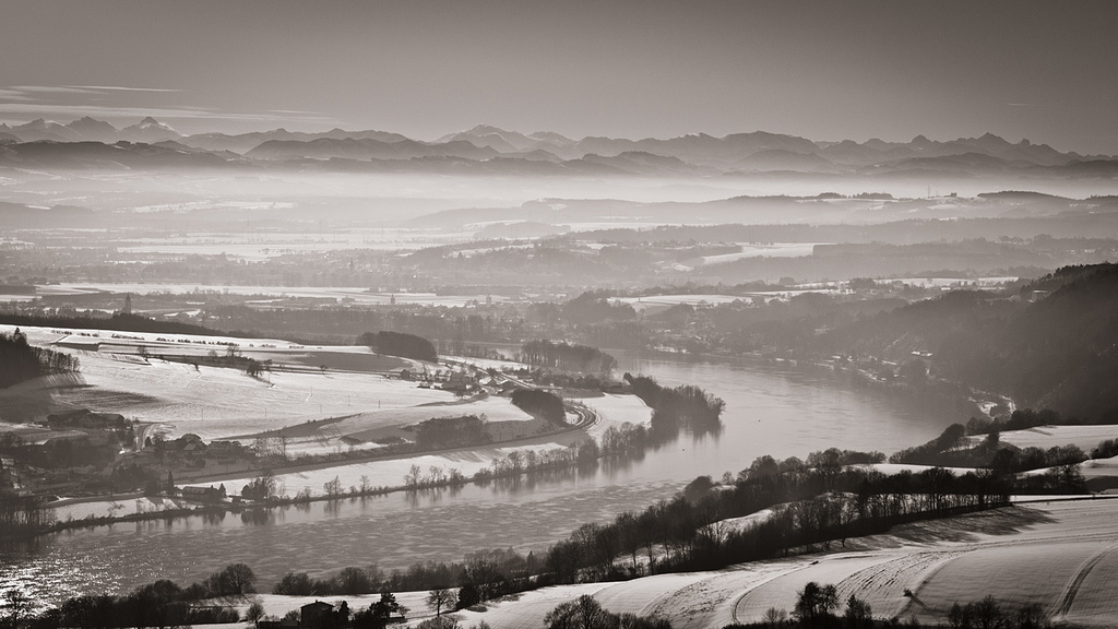 Böse Beuge der Donau, bei Gottsdorf/Persenbeug